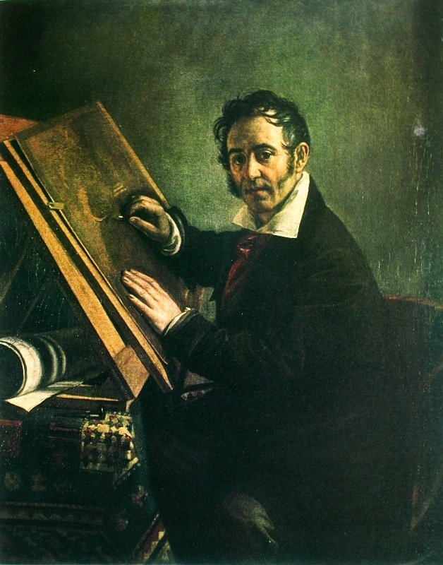 Тропинин Василий Андреевич. Портрет Н.И.Уткина. 1824г.